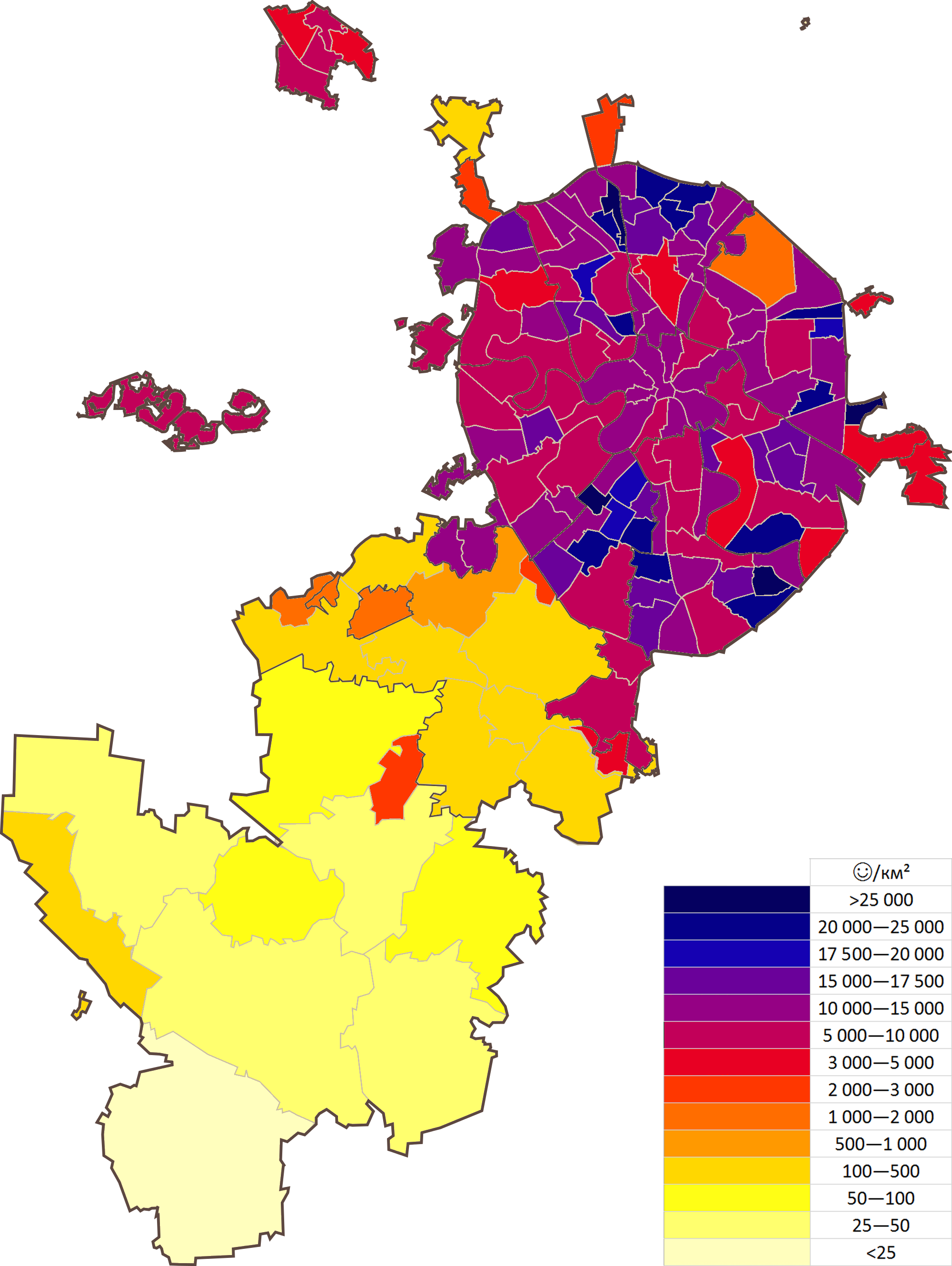 картосхема плотности населения Москвы